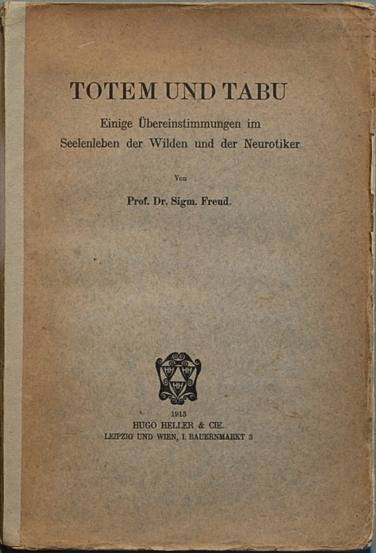 Freud, Sigmund: Totem und Tabu. Einige Übereinstimmungen im Seelenleben der Wilden und der Neurotiker. Leipzig und Wien: H. Heller & Cie.1913, 149 Seiten, 26 x 17,5 cm, Erstdruck. Rücken verstärkt.